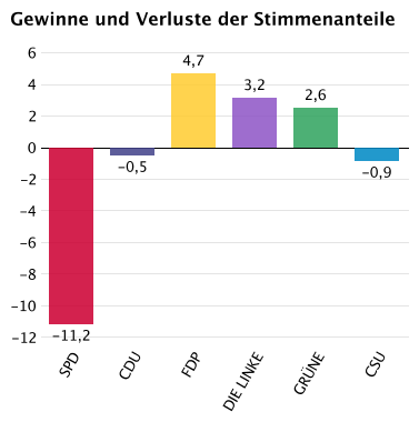 Zweitstimmenergebnis (Gewinne und Verluste) Bundestagswahl am 27. September 2009